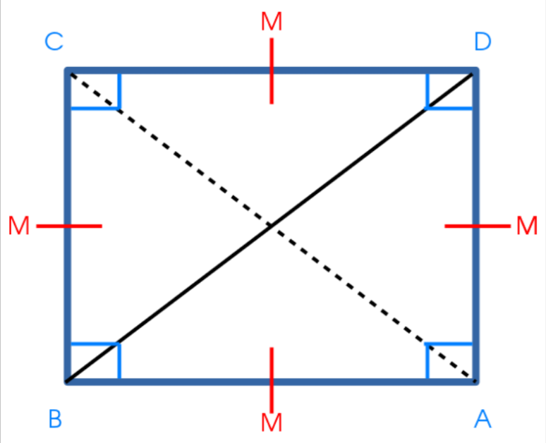 Ponto de encontro (intersecção) das diagonais de um quadrado é definido como o Centro de Massa do mesmo. Sendo assim, a imagem demostra os pontos médios e a simetria de um quadrado, revelando um único ponto de equilibro das forças atuantes.